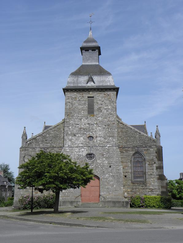 Église Saint-Pierre et Saint-Paul de Baguer-Morvan (35).